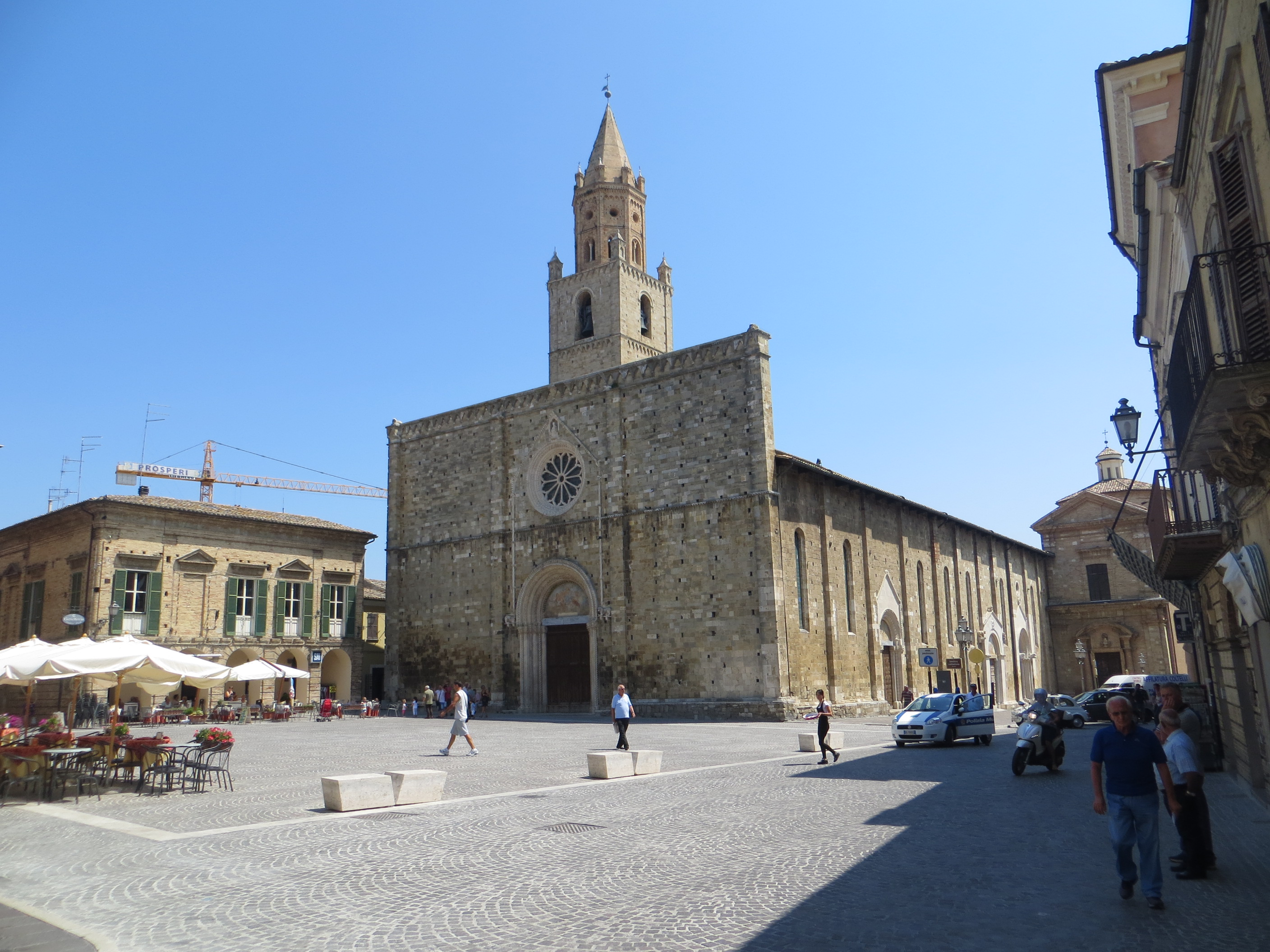 Duomo di Atri